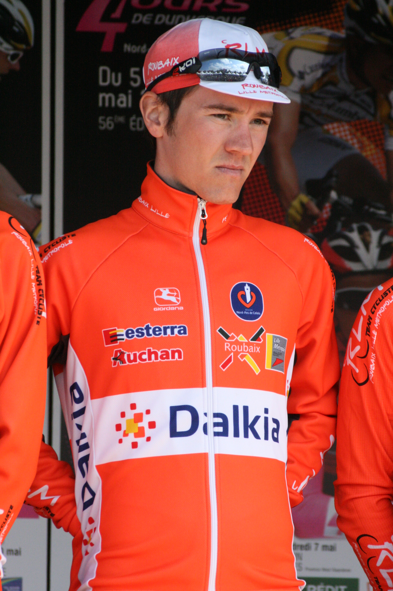 Alexandre Lemair lors de la présentation des équipes des 4 jours de Dunkerque 2010